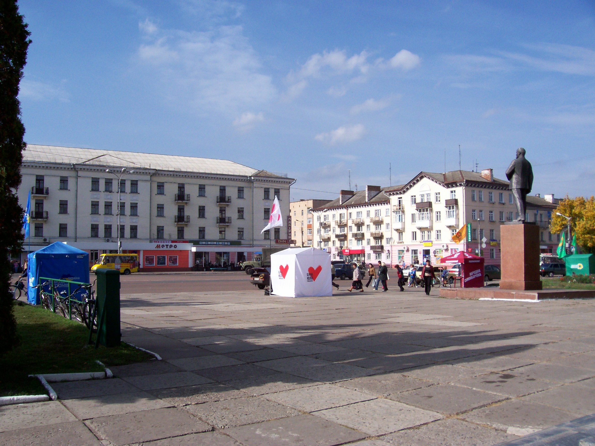 Ніжин - центр міста